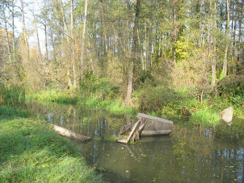 Чернігівська обл., Менський р-н, с. Киселівка. Дамба на річці Мена в центрі села